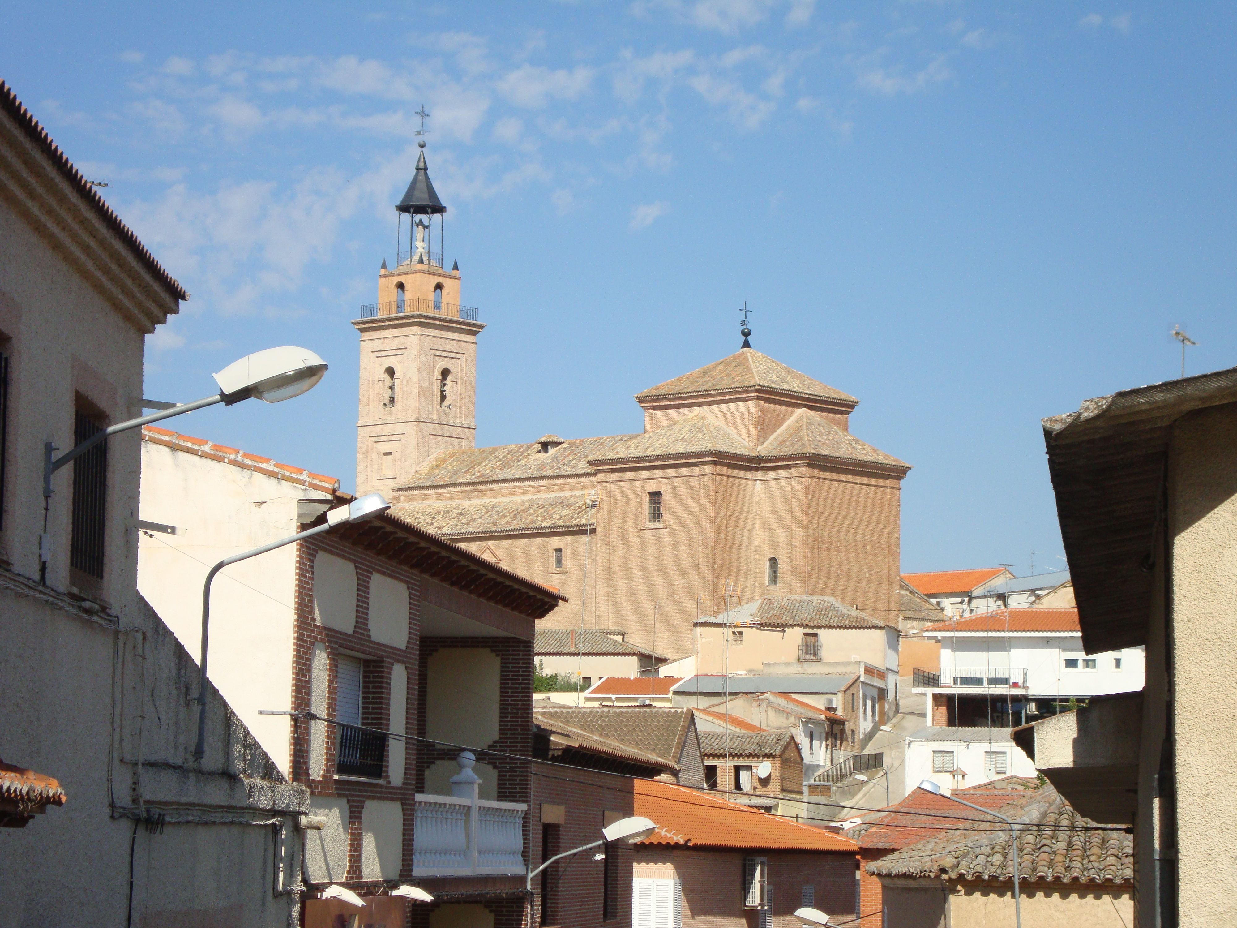 Iglesia del pueblo de Cebolla en España